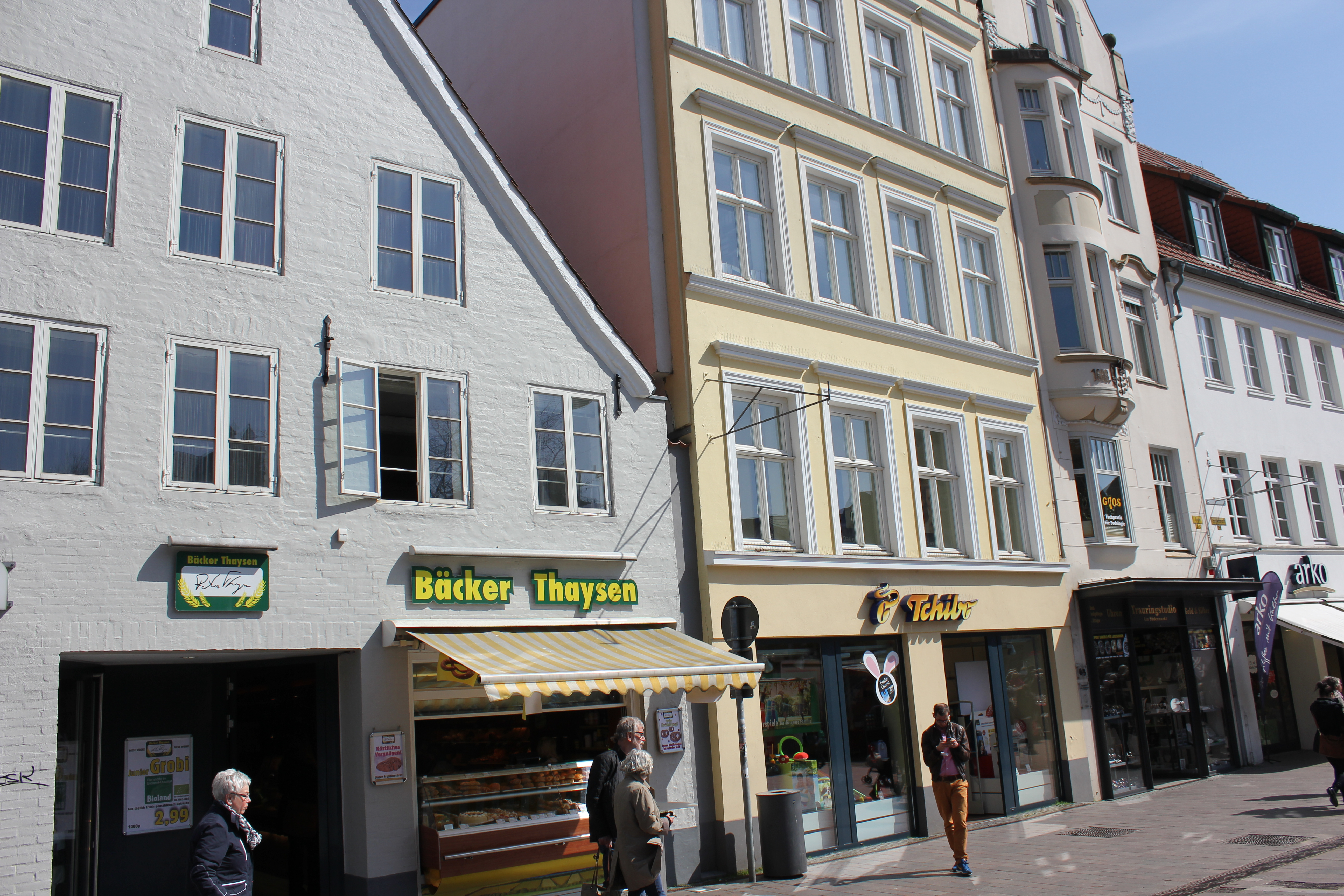 Flensburgs Holm, Das Straßenstück Katsund bzw Kattsund (Flensburg 2014), Bild 001